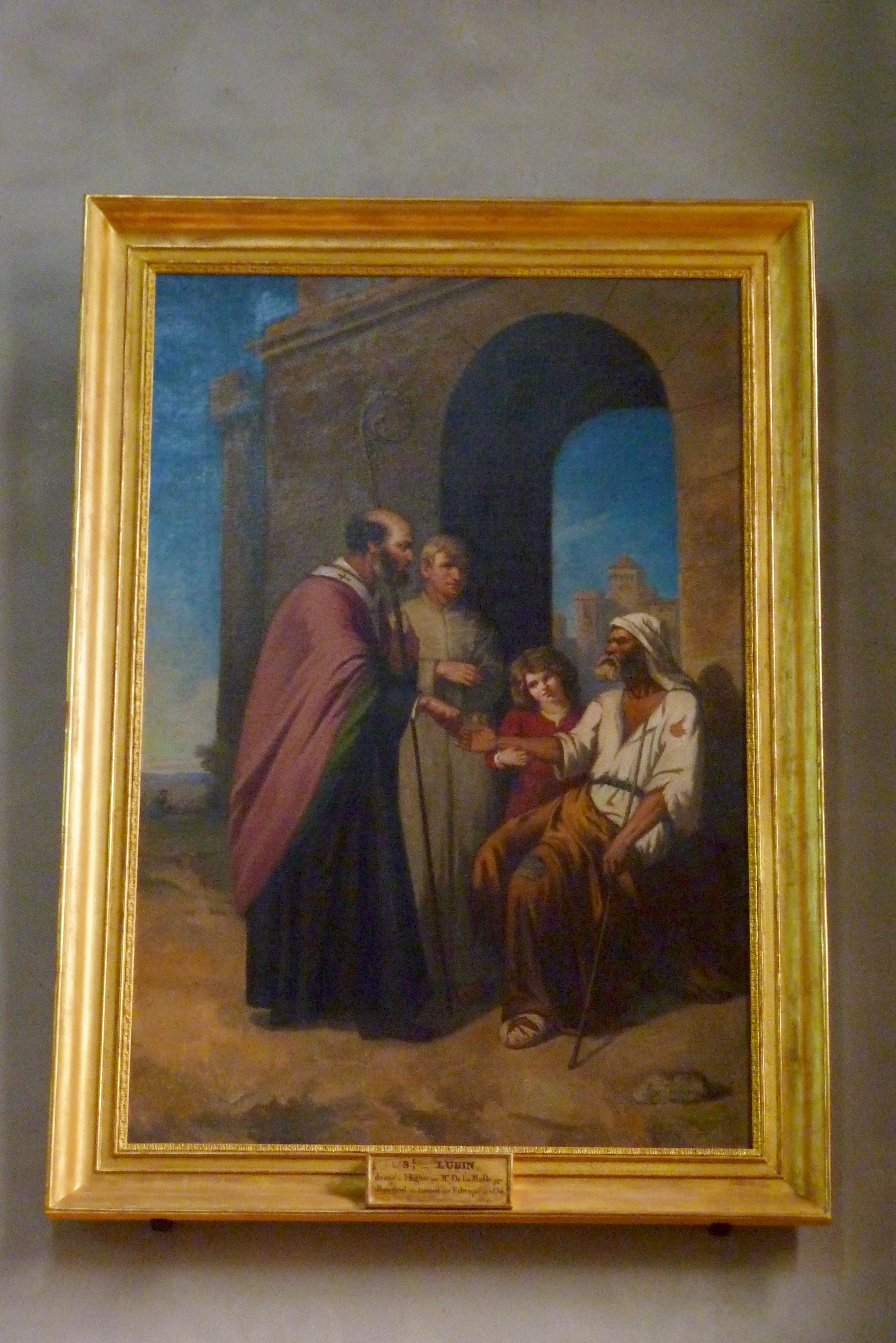 katholische Pfarrkirche Saint-Lubin in Rambouillet im Département Yvelines (Île-de-France), Gemälde St. Lubin besucht die Kranken von Eugène Tourneux, 19. Jahrhundert